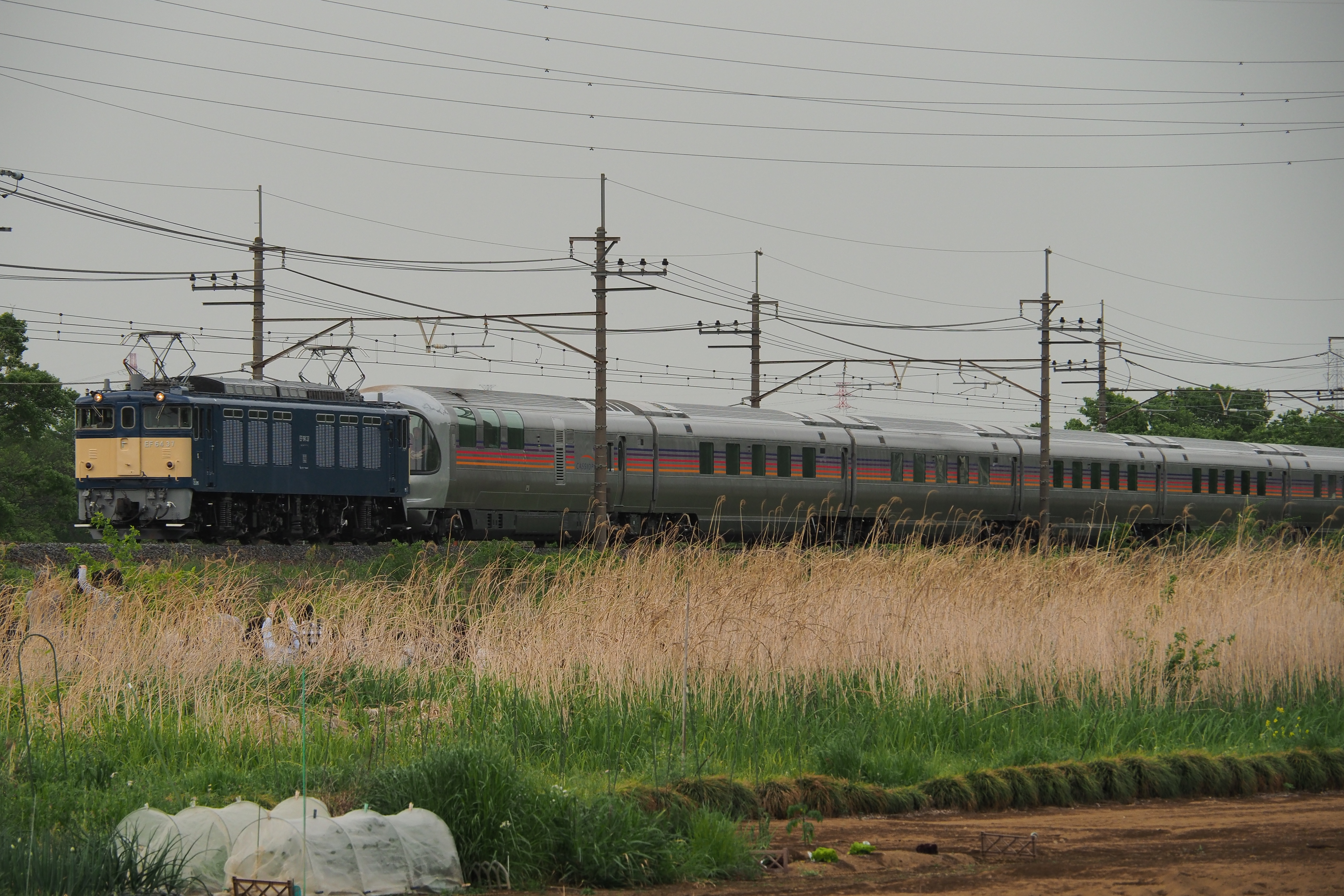 2019年5月3日運転の、長野行きカシオペア紀行。EF 64 37牽引